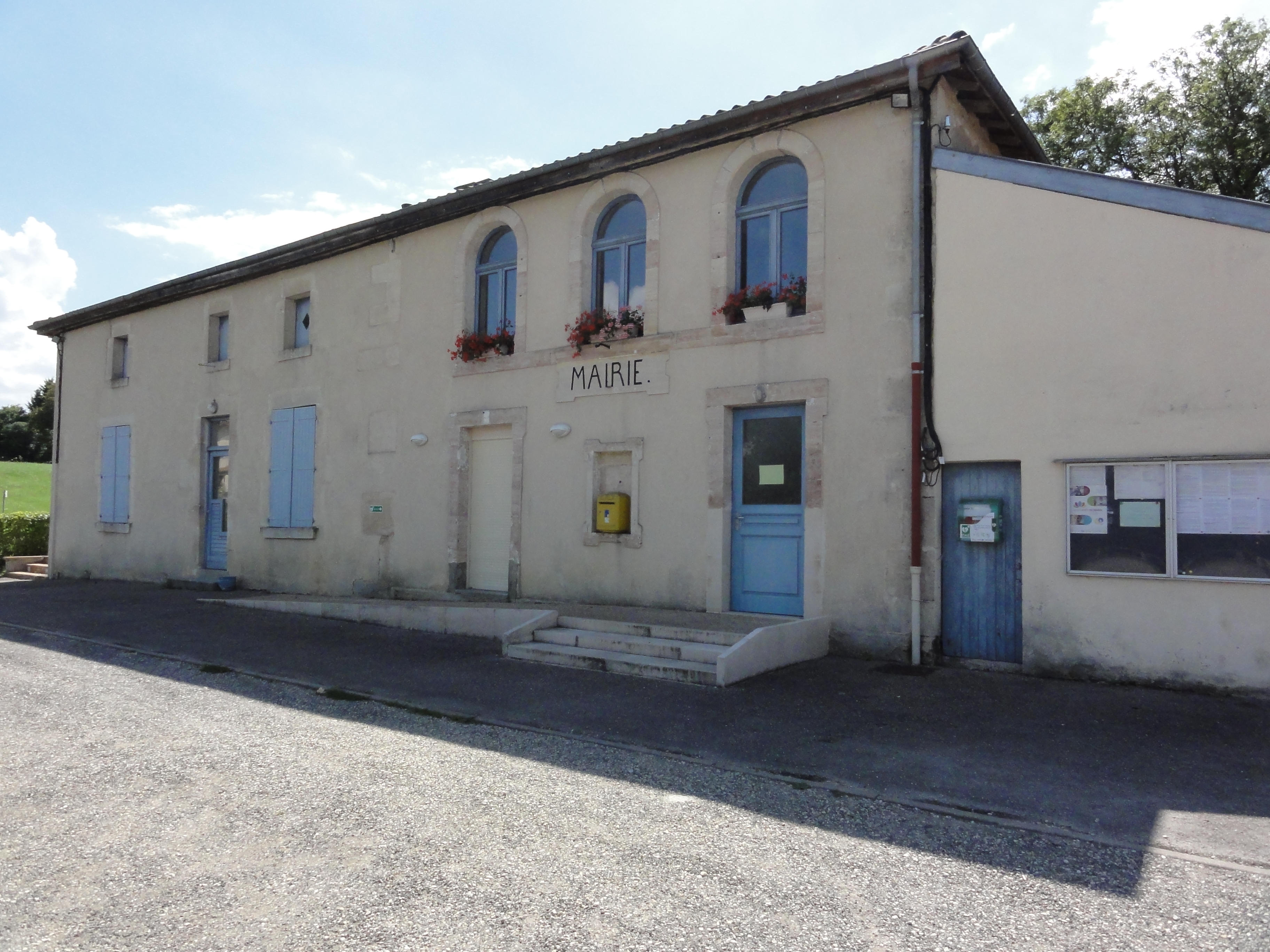 Érize-Saint-Dizier (Meuse) mairie et salle des fêtes